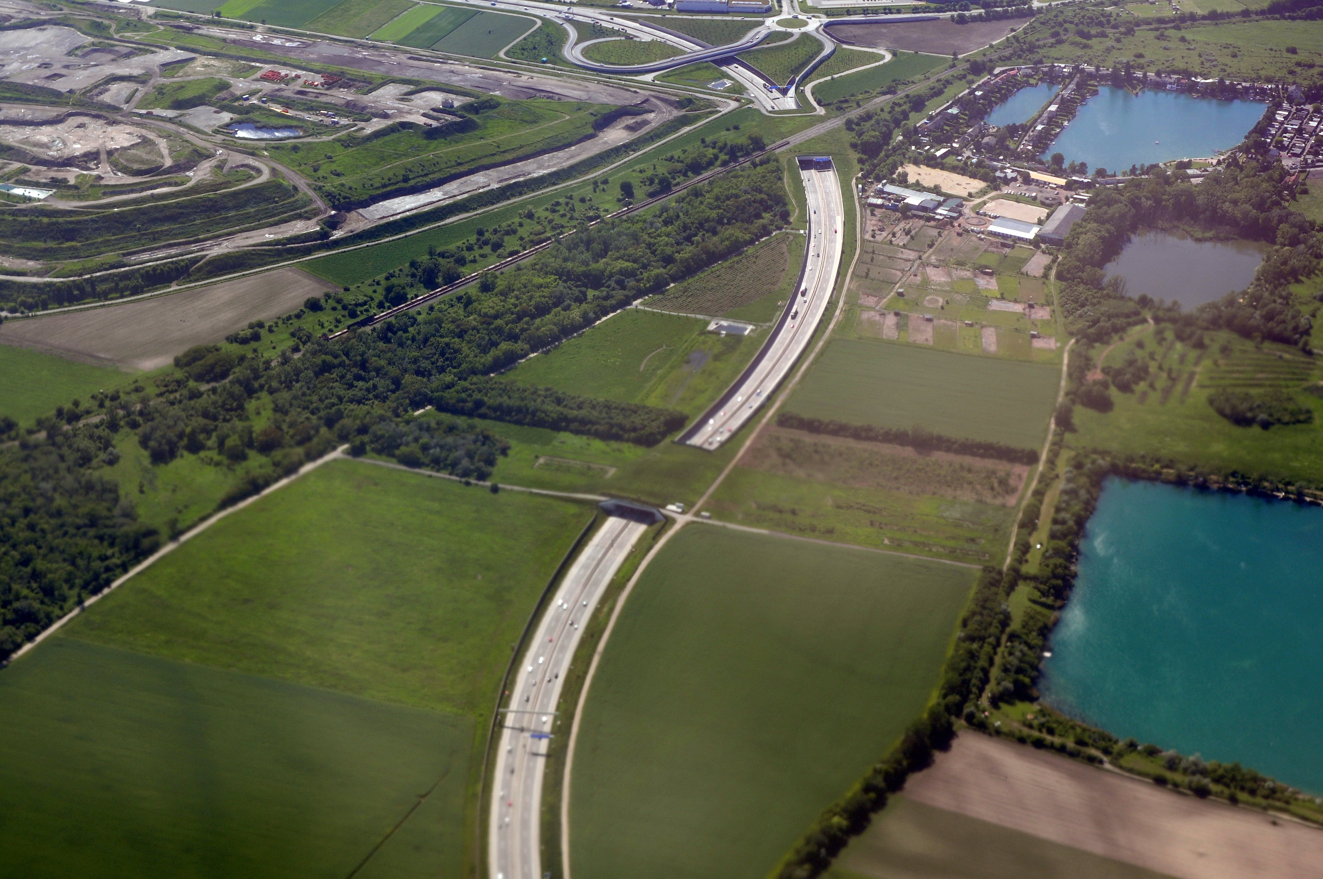 Landeanflug Wien-Schwechat